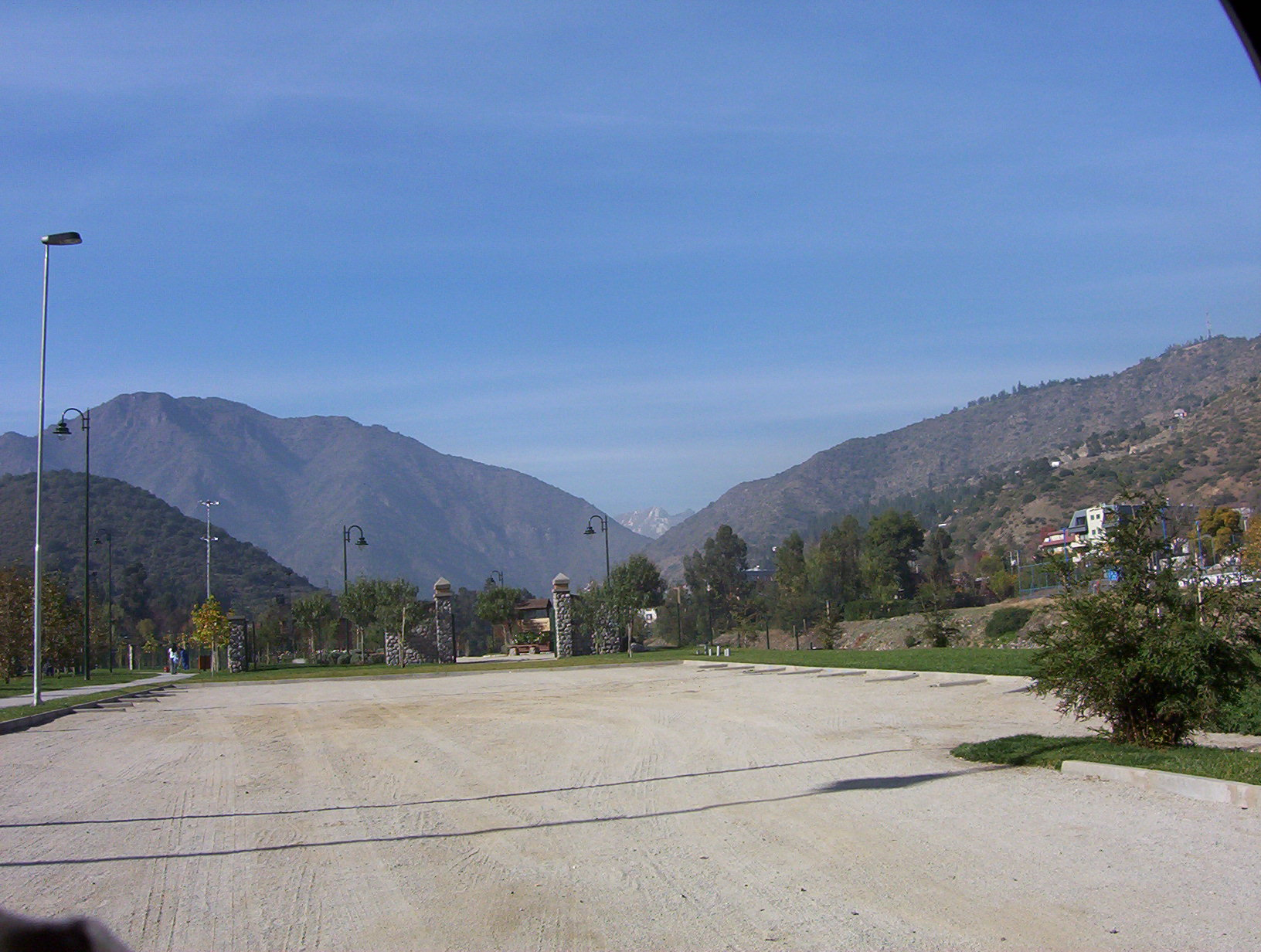 Parque Las Rosas en Lo Barnechea Chile